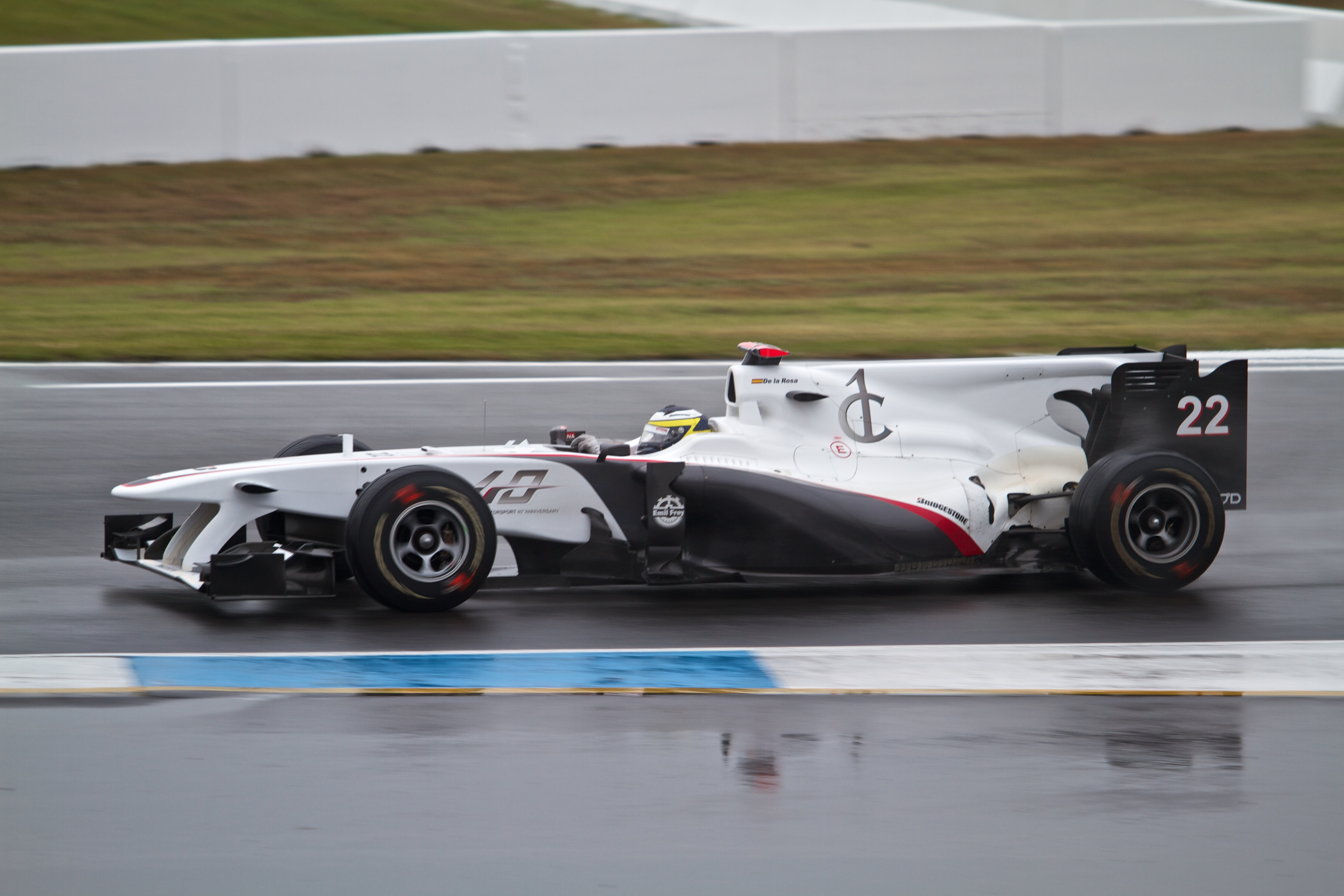 Pedro de la Rosa à Hockenheim en 2010